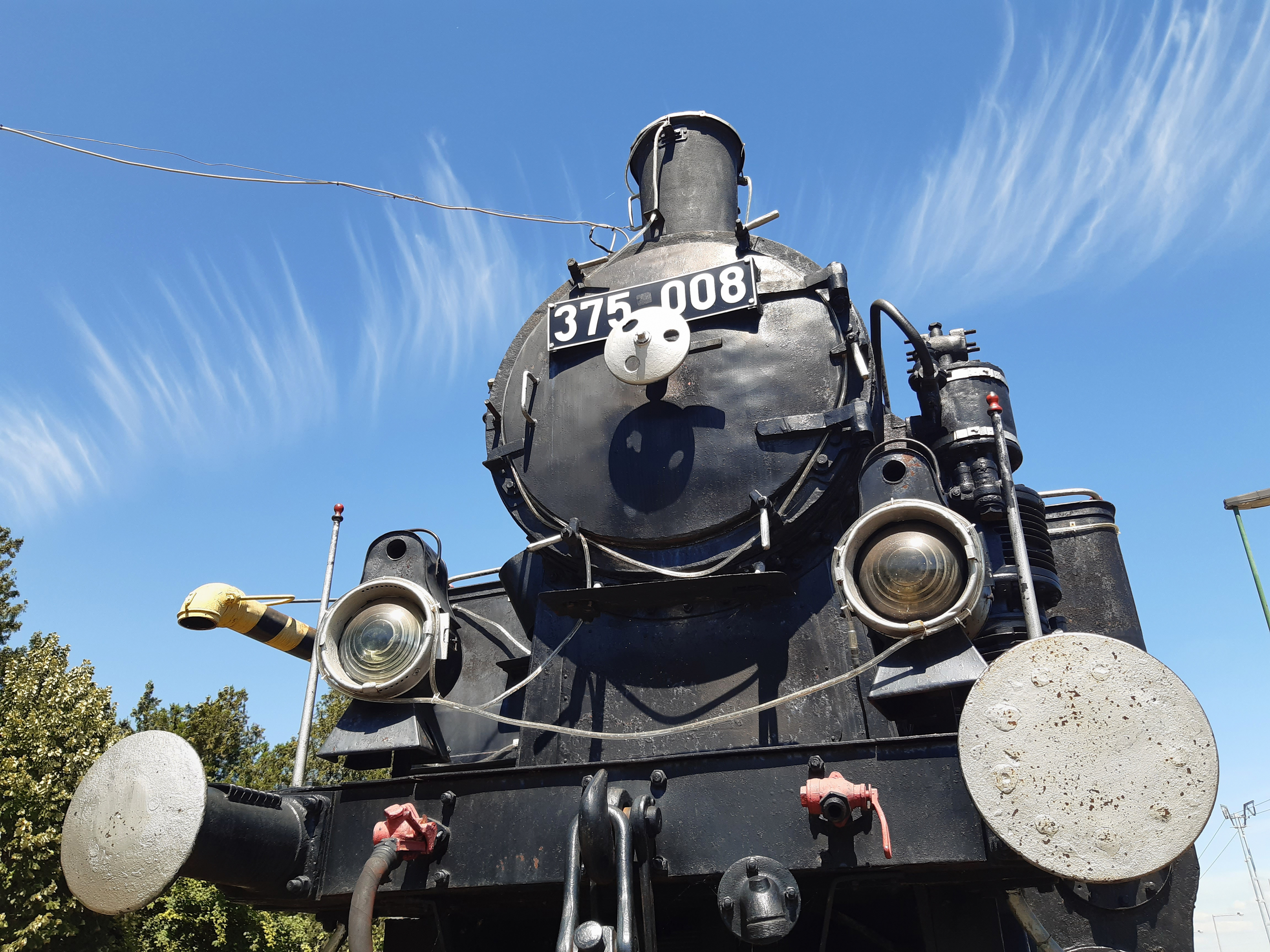 375 008 mozdony Csopak vasúti megállóhelynél